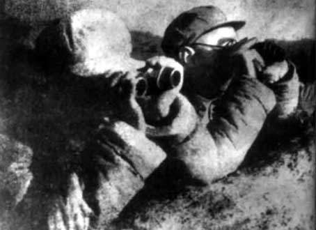 徐向前在前沿阵地